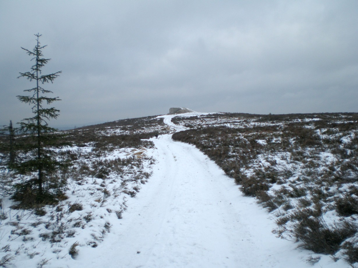 Vrchol hory Houpák (794 m) na dopadové ploše Jordán